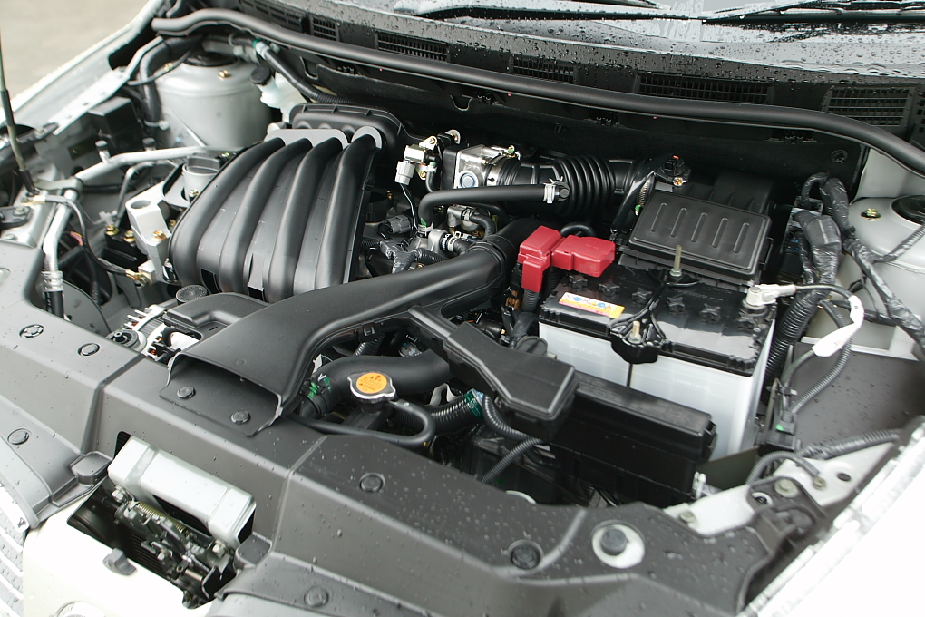 Nissan HR15DE engine.